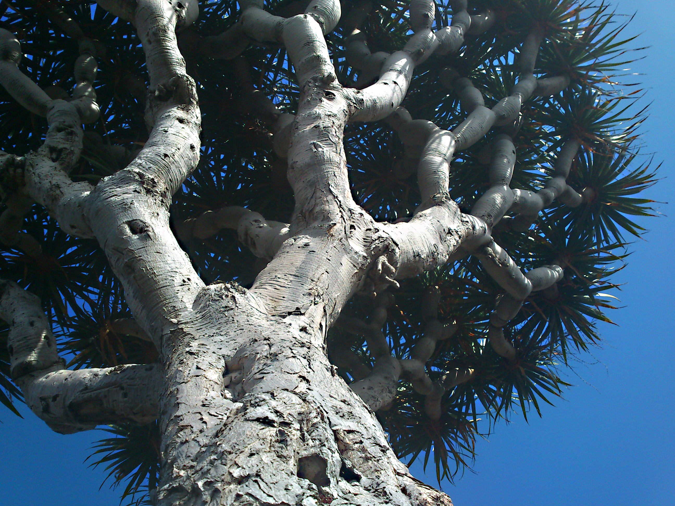 Ramas de un drago